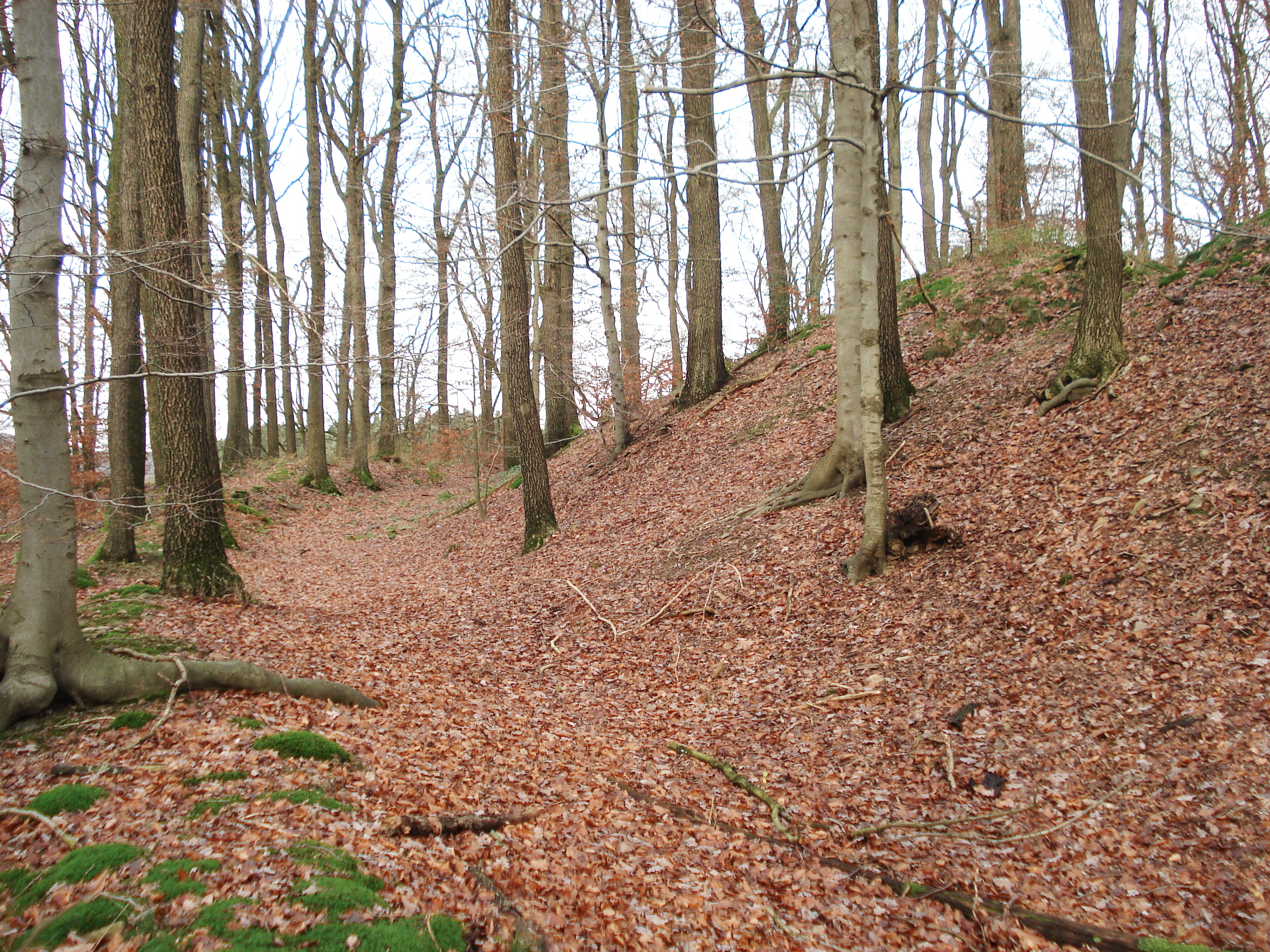 Hagen-Ambrock Wallburg, innerer und mittlerer Wall am westlichen Hang